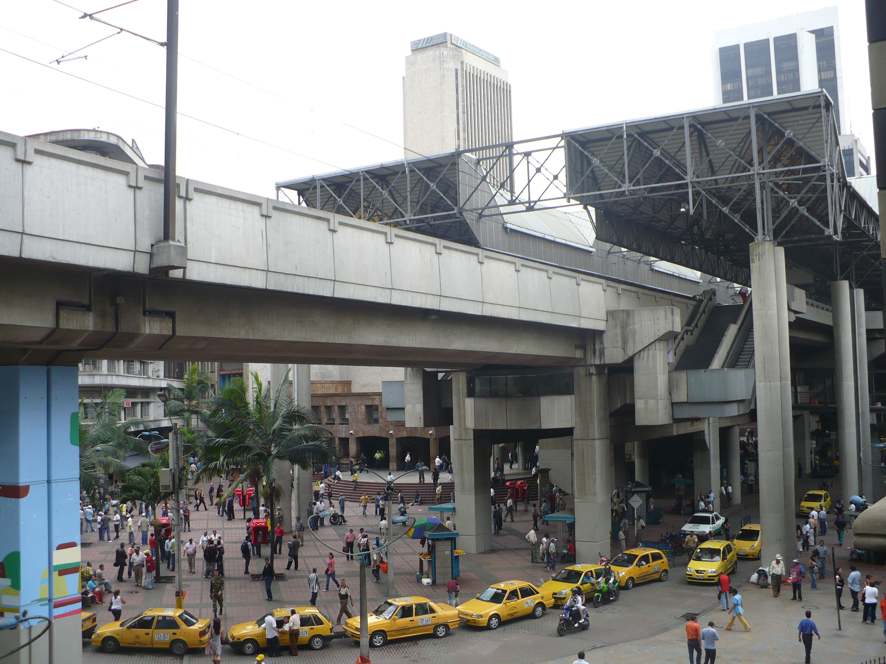 Estación Parque Berrío, Medellín.